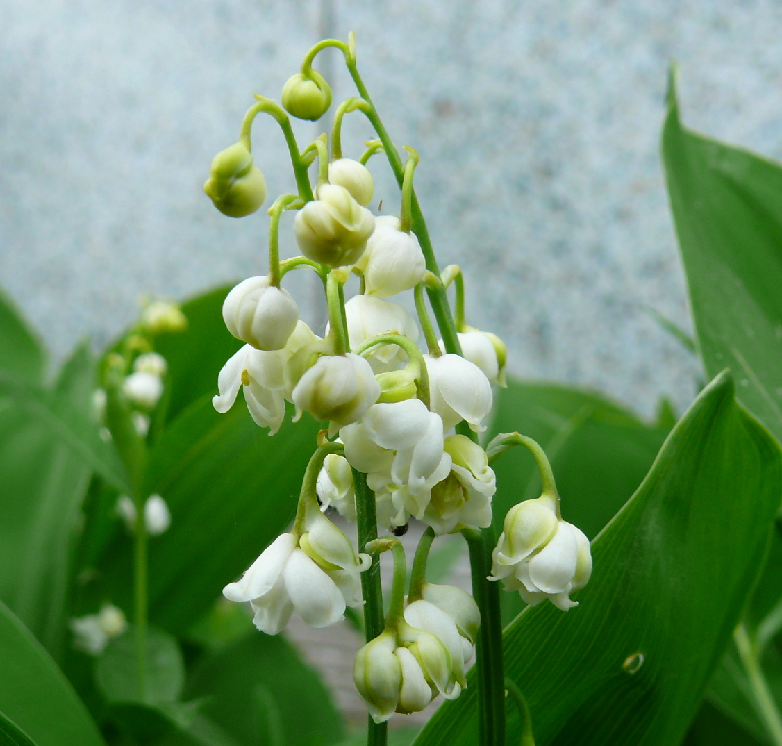 Convallaria majalis cv. Plena